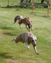 Courses de Lévriers Whippet